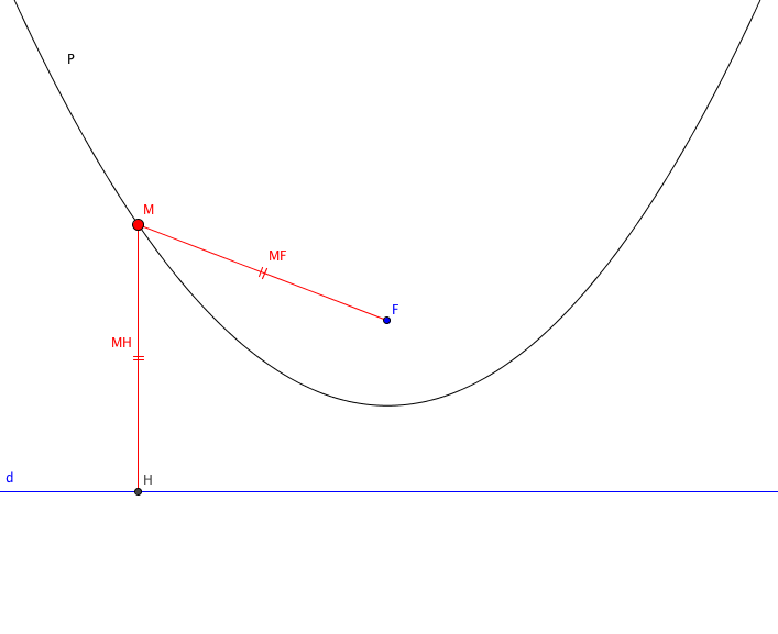 parabole de droite directrice d et de foyer F. ensemble des points M du plan P à égale distance du foyer F et de la droite D, c'est à dire vérifiant : MF = MH où H est le projeté orthogonal de M sur d.